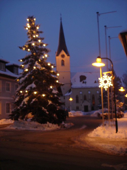 Regauer Kirche am Marktplatz, Regau, Oberösterreich